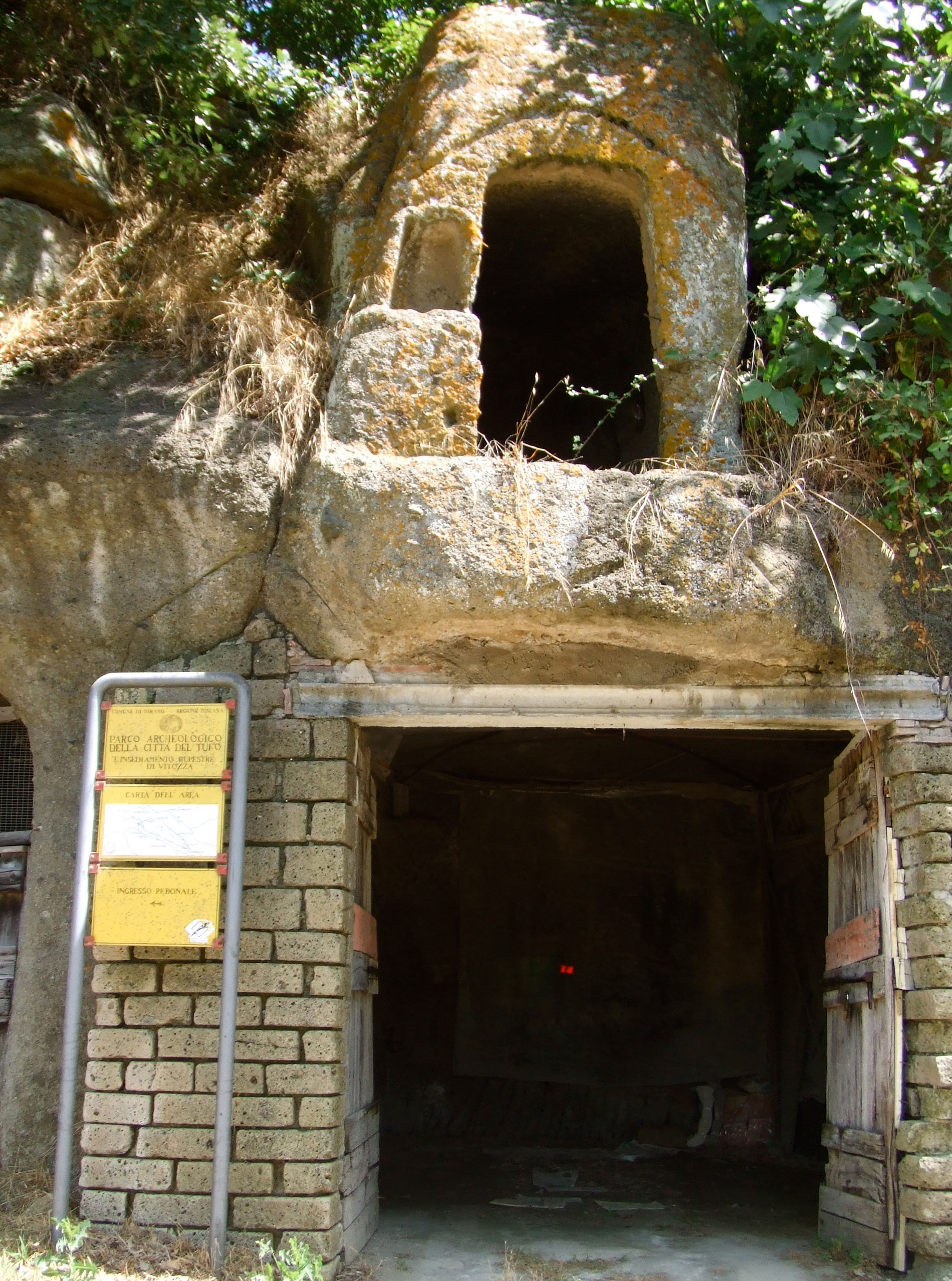 Entrée du site de Vitozza près de Sorano (Toscane)